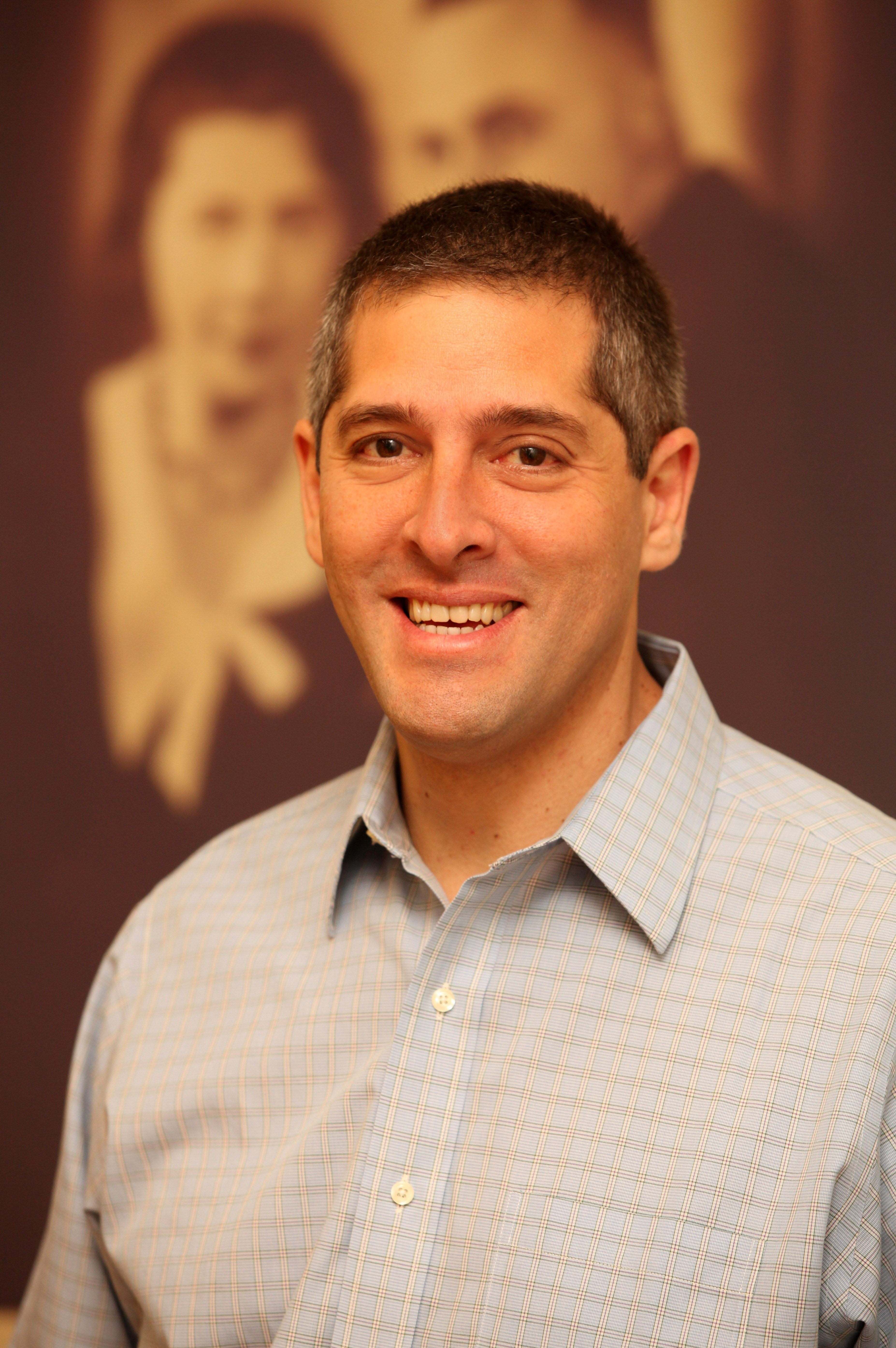 גדי לסין, נשיא ומנכ"ל קבוצת שטראוס.